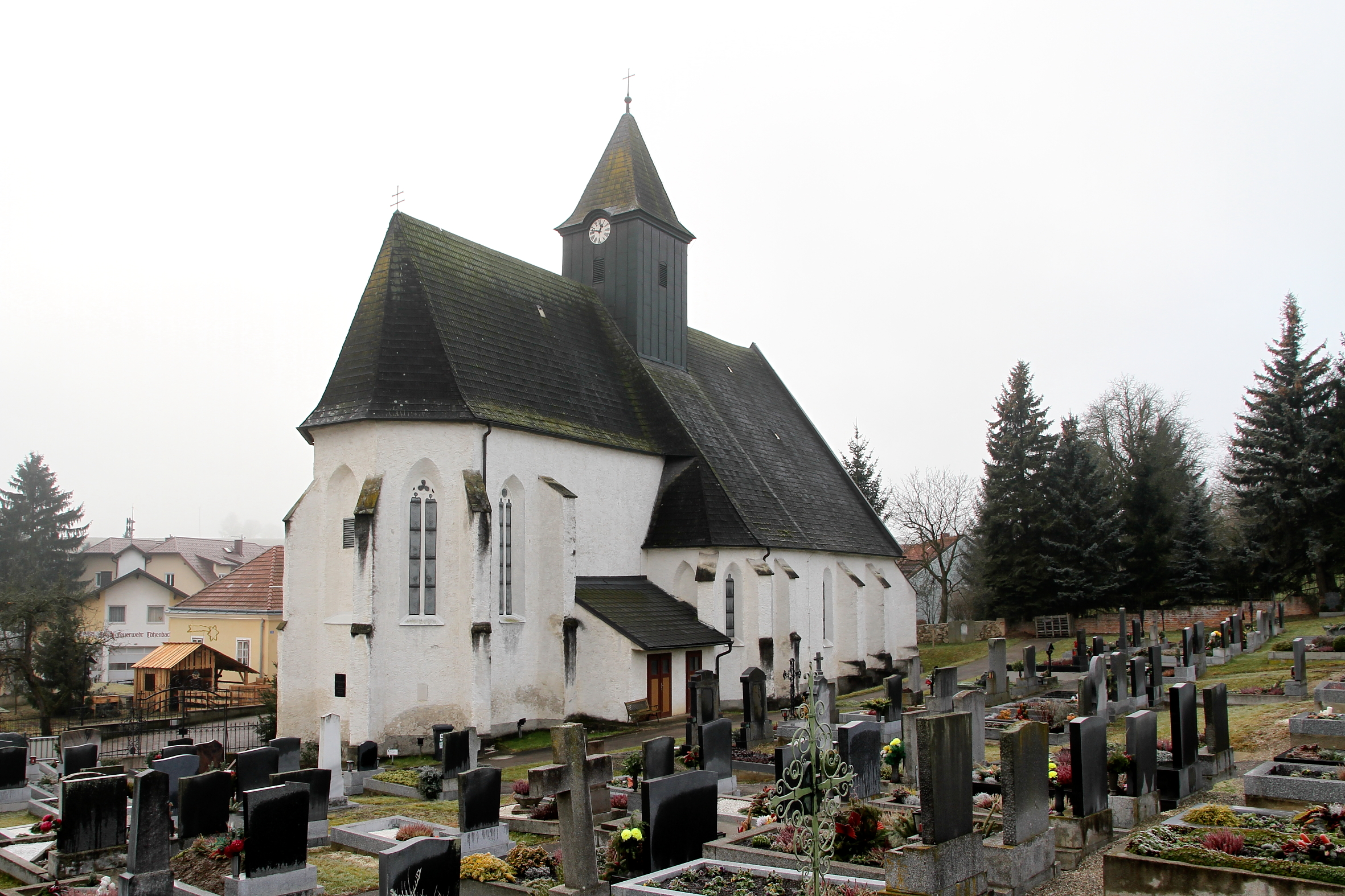 Kath. Pfarrkirche Alle Heiligen und Friedhof in Totzenbach, ein Ortsteil der niederösterreichischen Marktgemeinde Kirchstetten. Ein Sakralbau aus dem 14. Jahrhundert mit einem gotischen Staffellanghaus und Langchor.